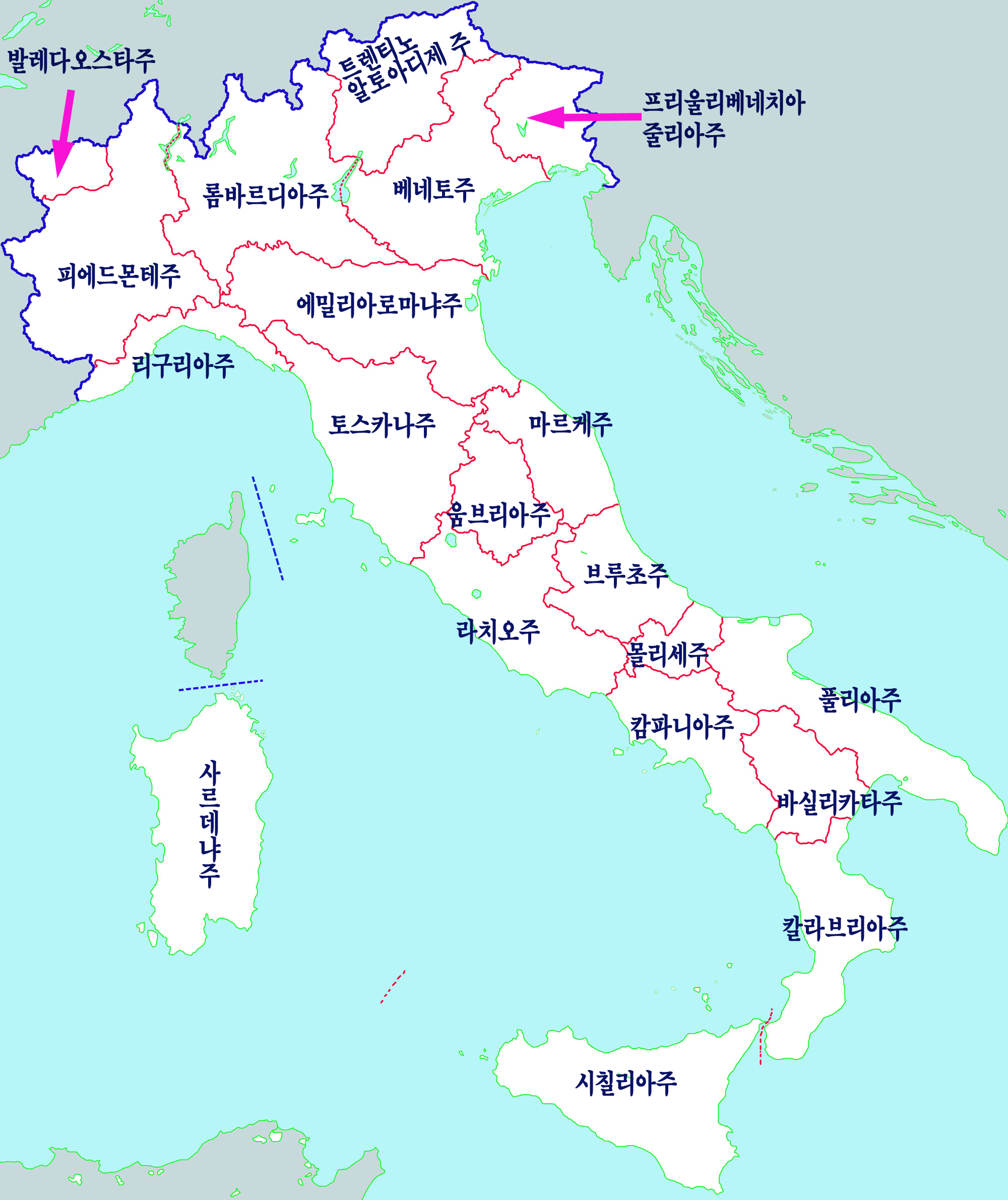 이탈리아 행정구역도